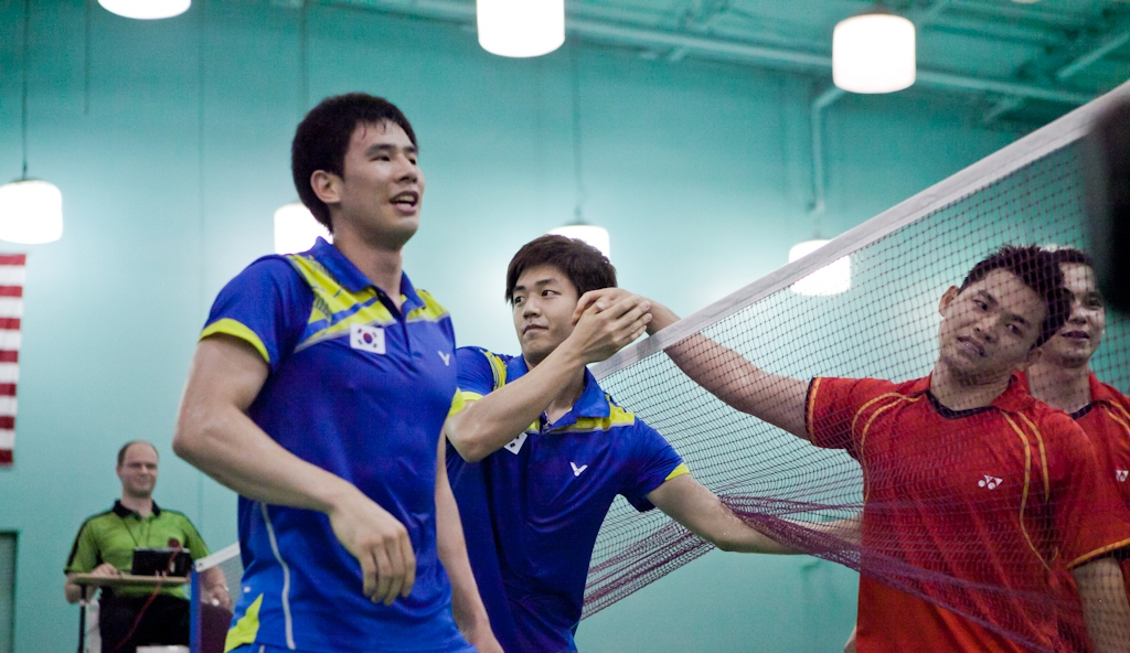 US Open Badminton 2011